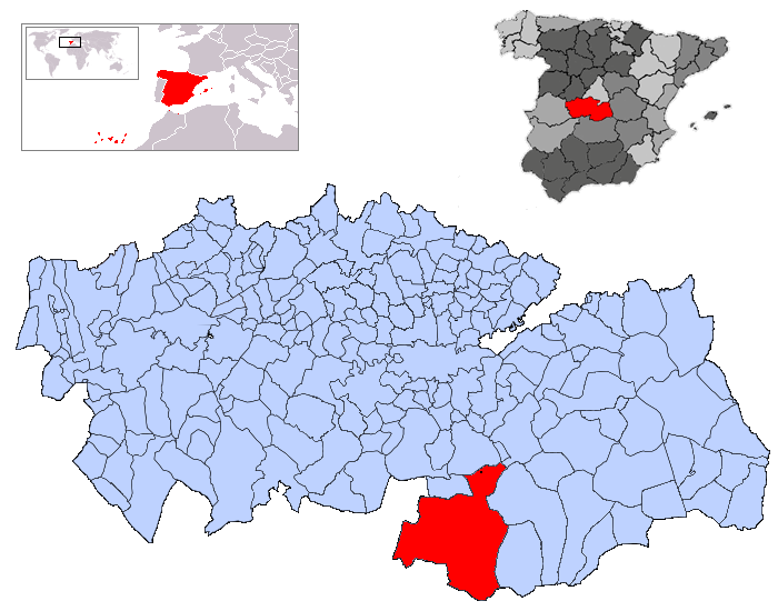 Los Yébenes en la provincia de Toledo